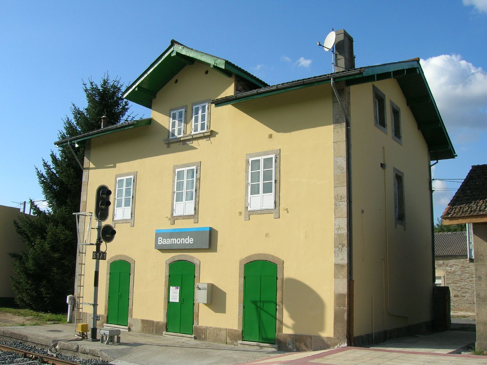 Estación de ferrocarril de Baamonde, Begonte.